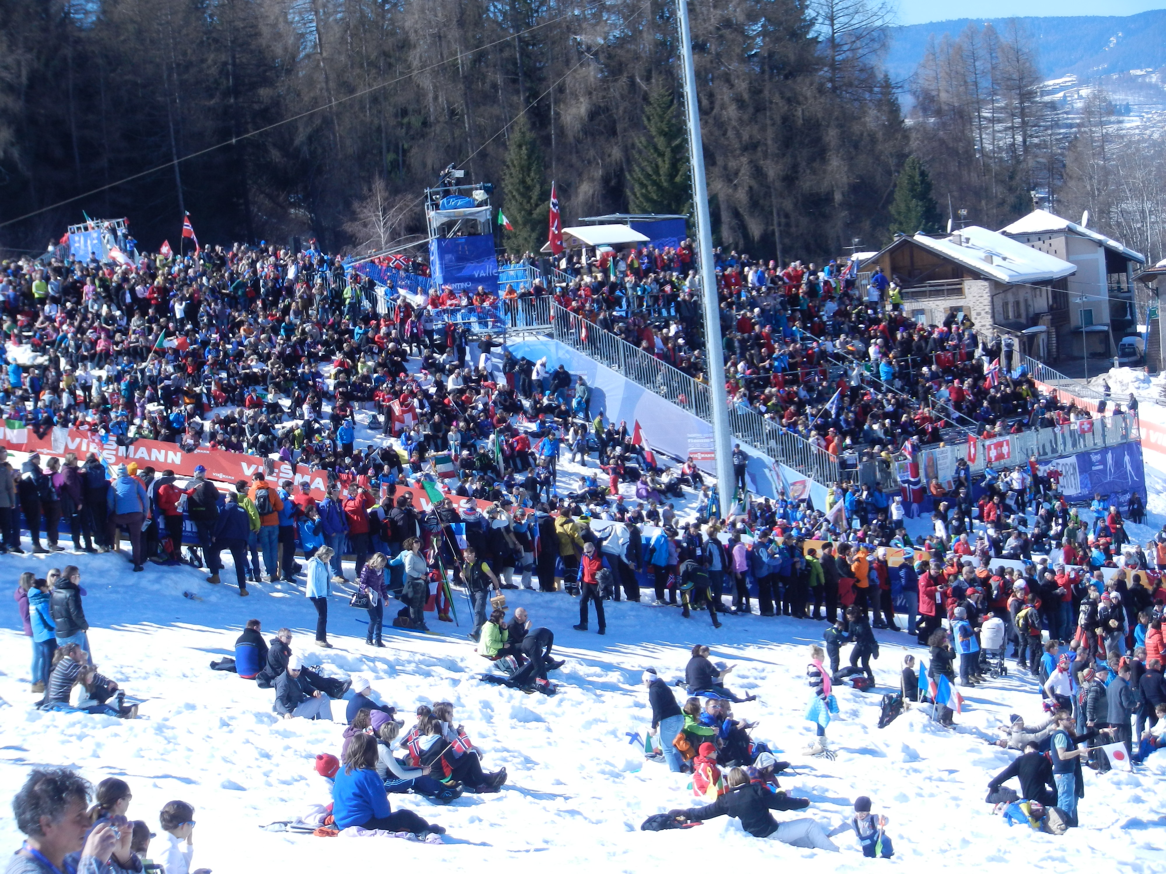 Spalti gremiti nella 50 km,Fiemme 2013